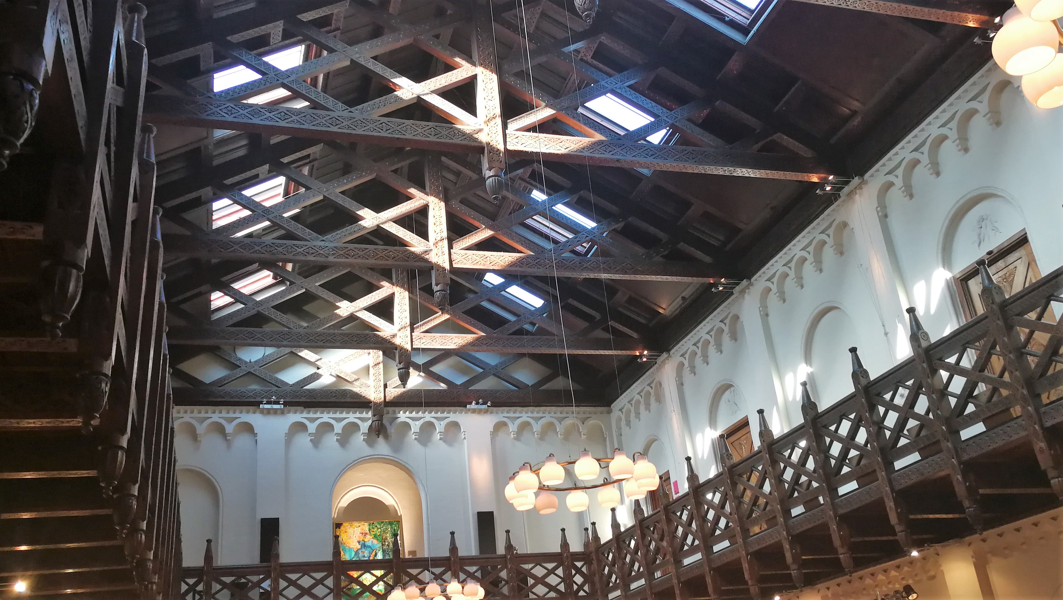 Bygningskulturens Hus